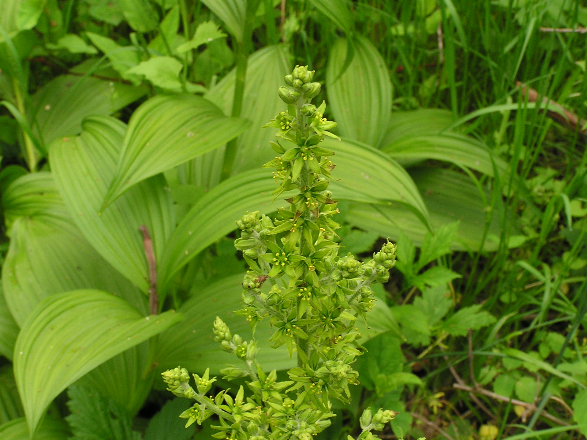 Veratrum veride